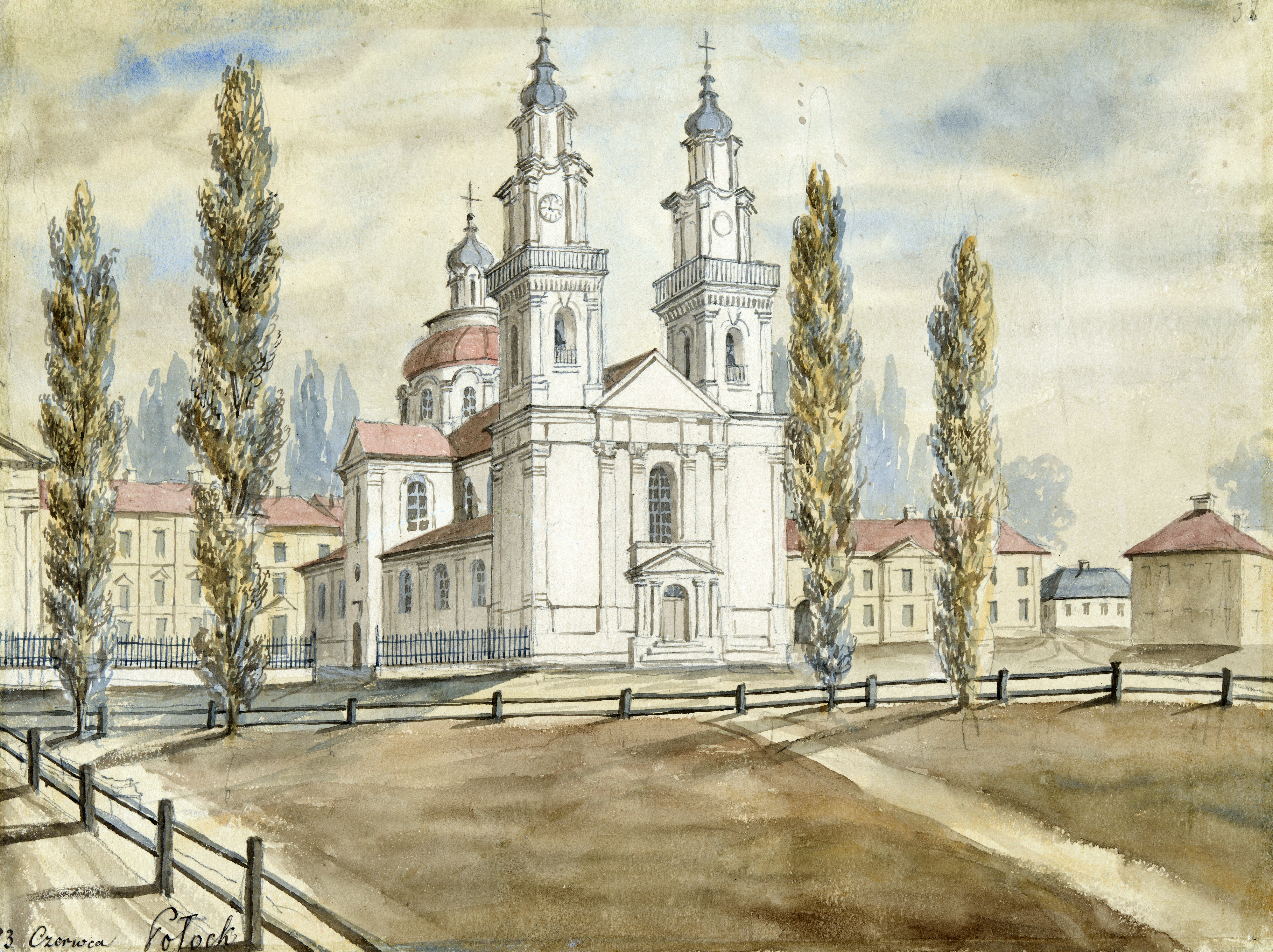 Беларуская (тарашкевіца): Полацак (Połacak), пляц Рынак (plac Rynak). Касьцёл Сьвятога Стэфана і калегіюм езуітаў